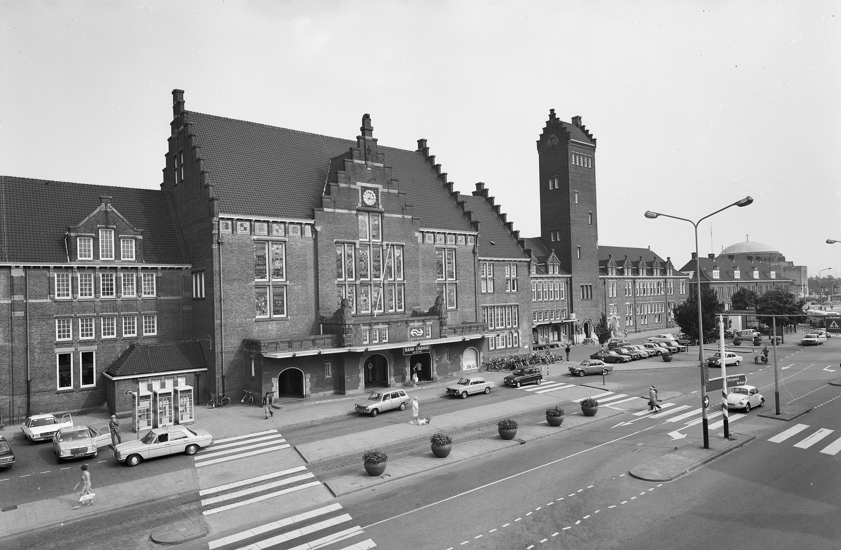 Station Nederlandse Spoorwegen: voorgevel